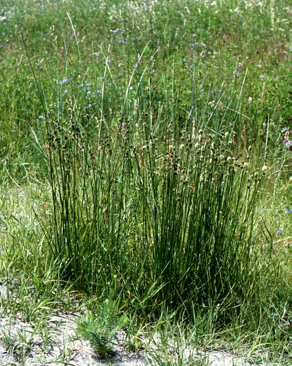 Kugelbinse (Scirpoides holoschoenus, Syn.: Holoschoenus romanus), Sauergräser (Cyperaceae) - Österreich/Austria/Autriche: Burgenland, Seewinkel, Illmitz